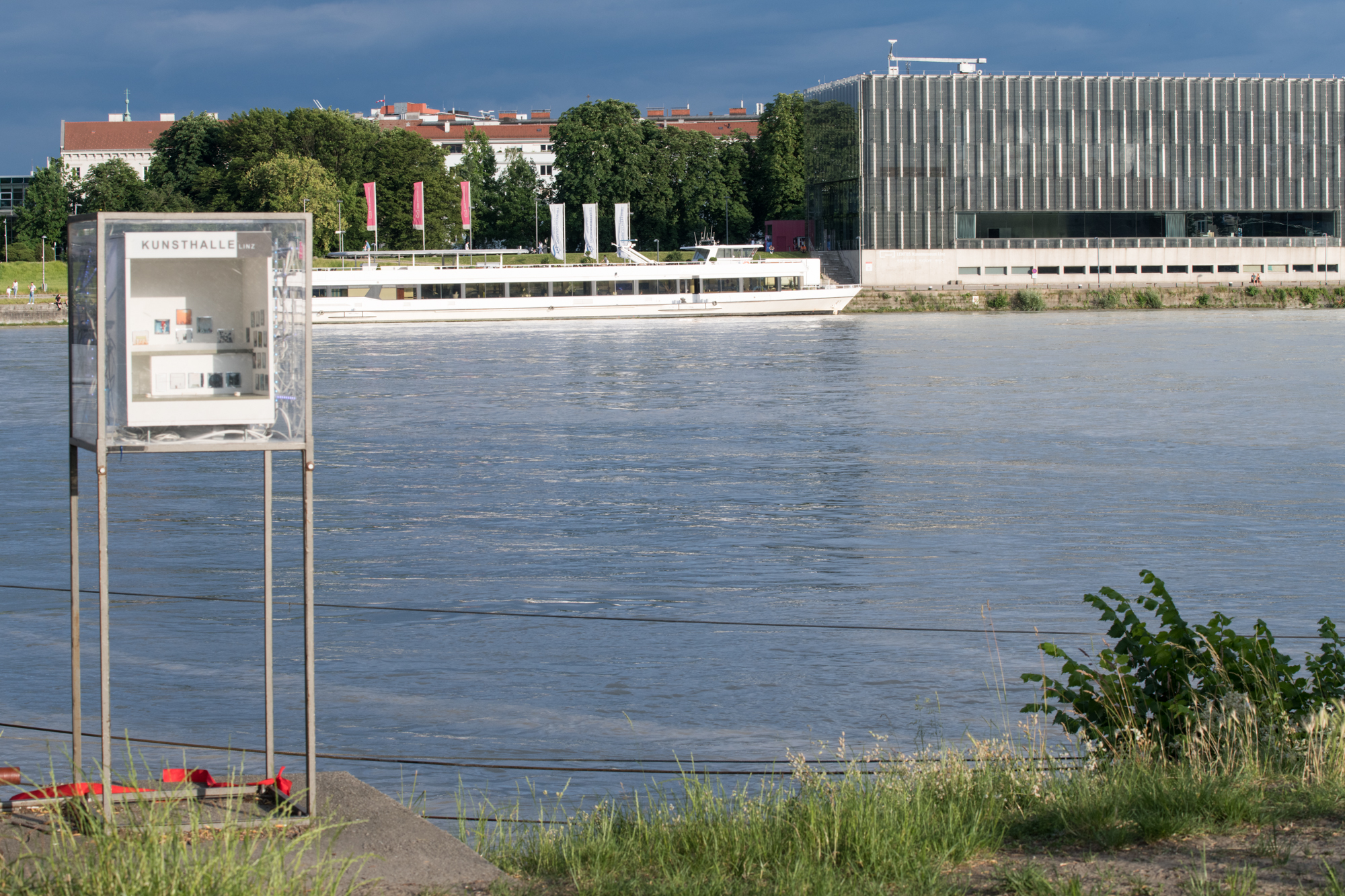 Kunsthalle Linz, rechts im Hintergrund das Lentos Kunstmuseum